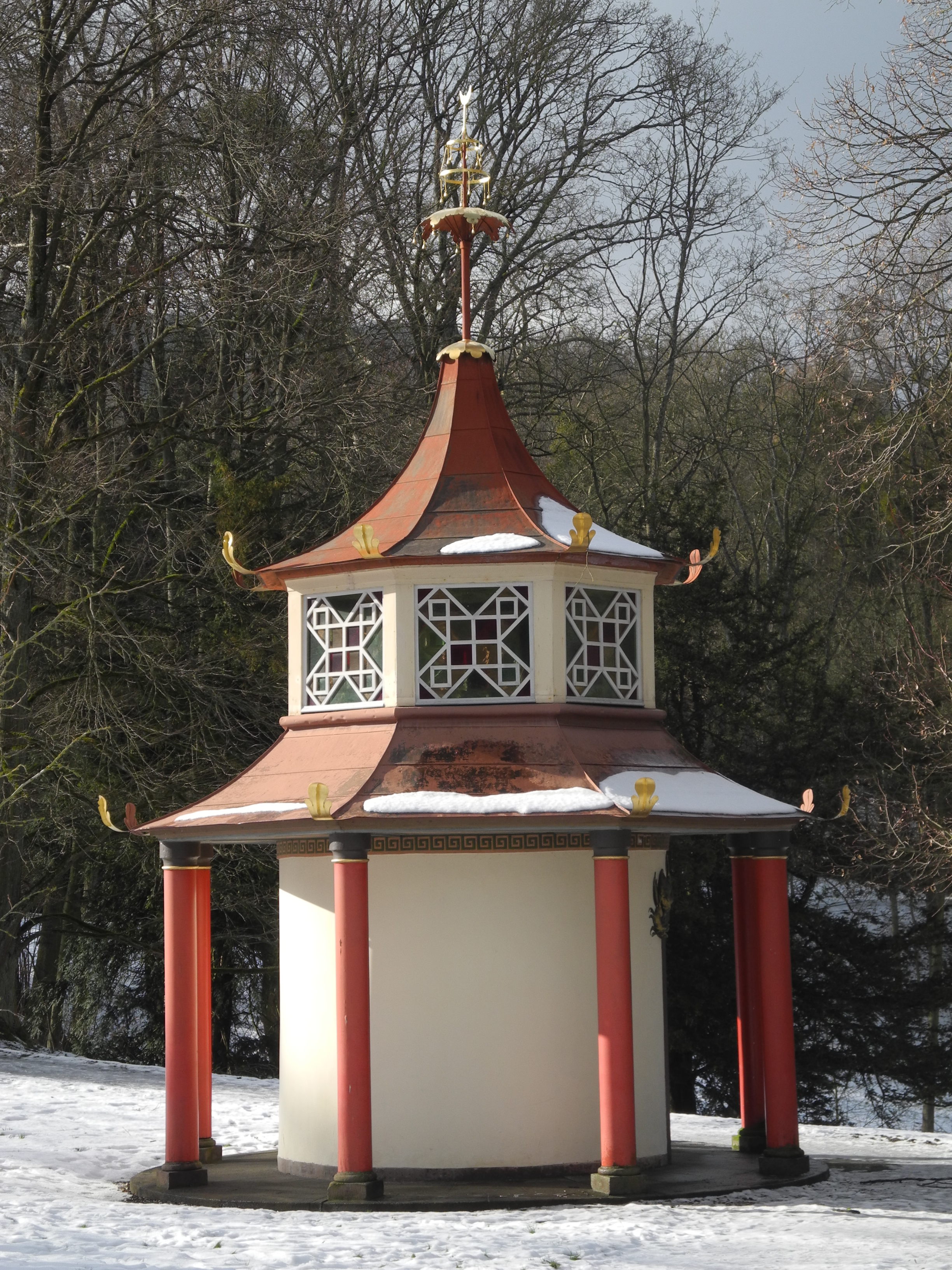 Die Pagode in Mulang ist ein Gebäude im Bergpark Wilhelmshöhe in Kassel, Hessen, Deutschland.Erbaut zwischen 1776 - 1782 nach Plänen von Simon Louis du Ry.